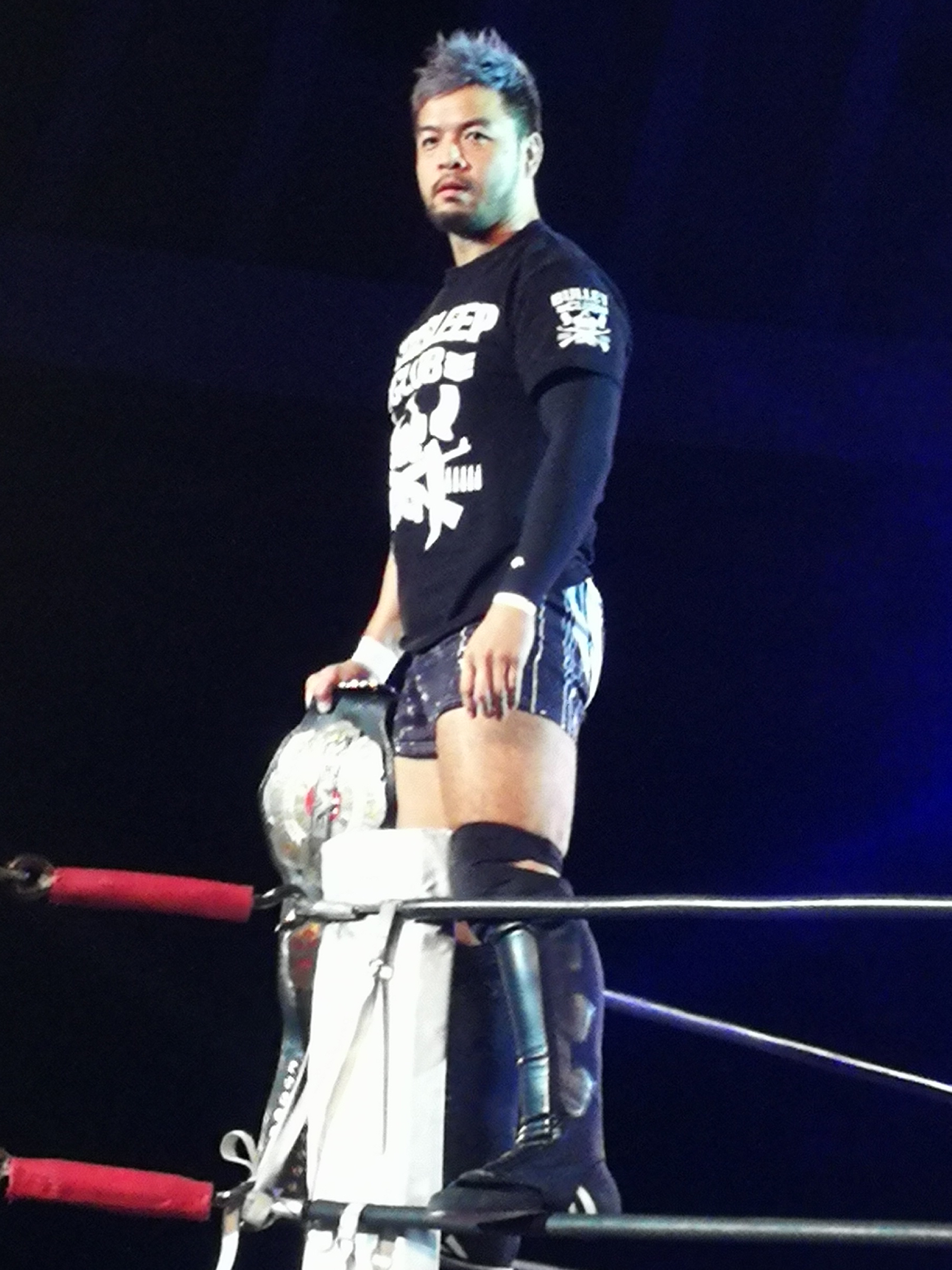 2019年12月2日大阪・大阪市中央体育館・サブアリーナ（丸善インテックアリーナ大阪） のKENTA選手